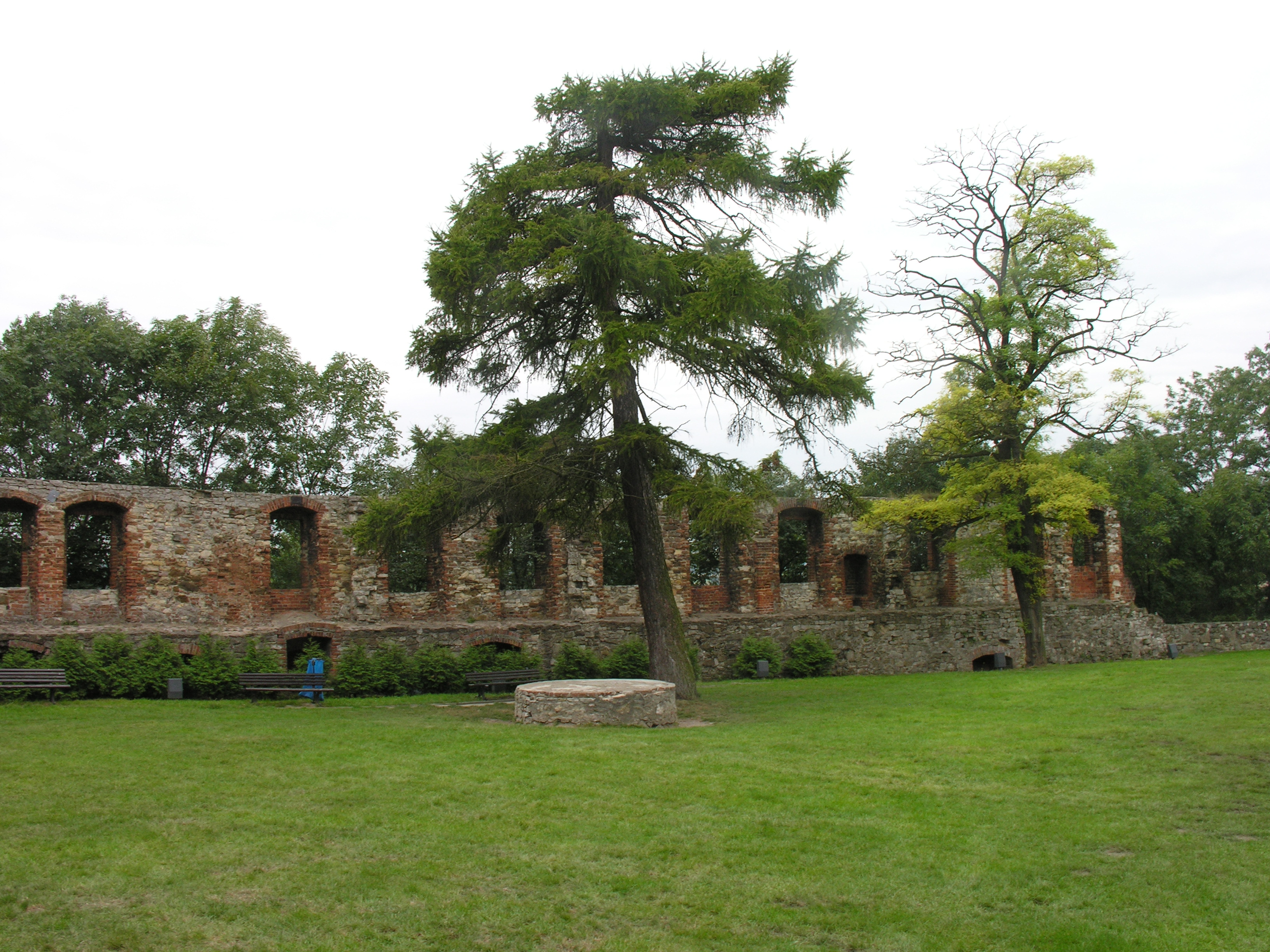 Dziedziniec zamku w Toszku